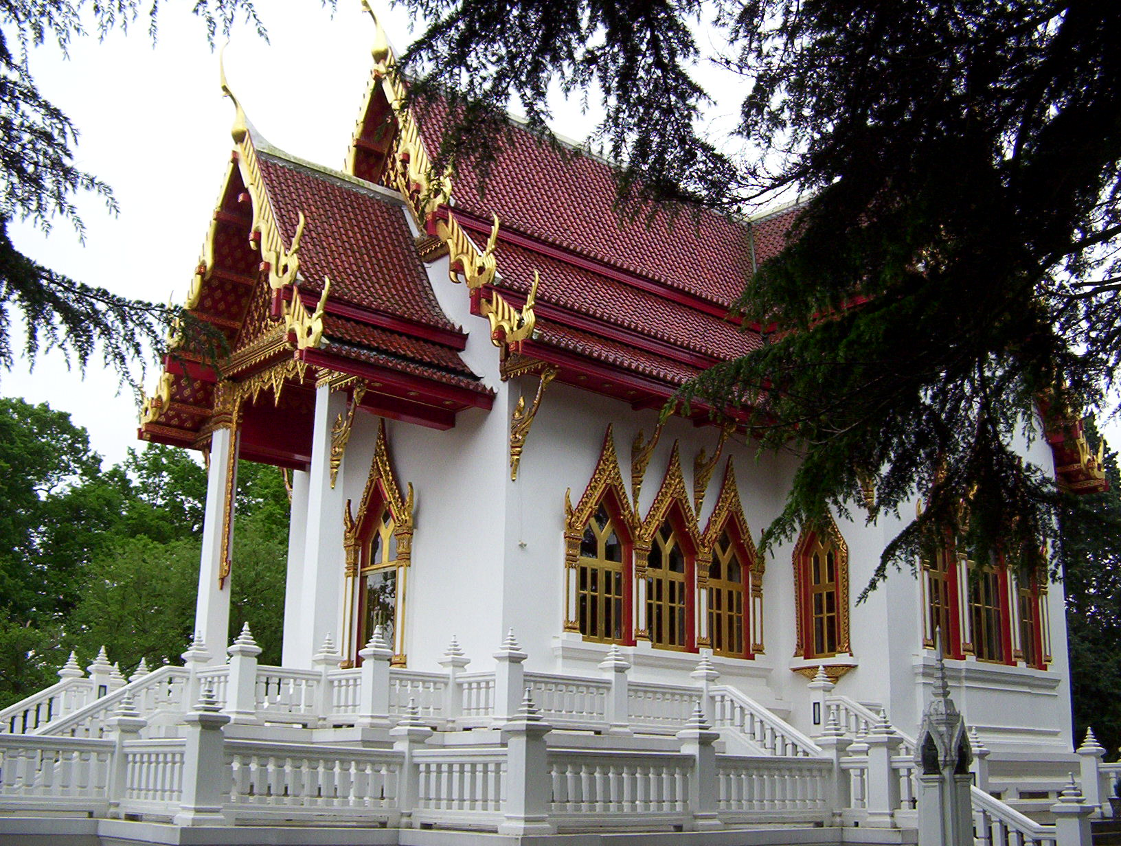 Zdjęcie Thaiskiej świątyni (konkretnie viharn'u - najświętszego miejsca świątyni), tradycji Theravada. Wykonana 21 maja 2006 w Londynie (Wimbledon). Autor: Siristru